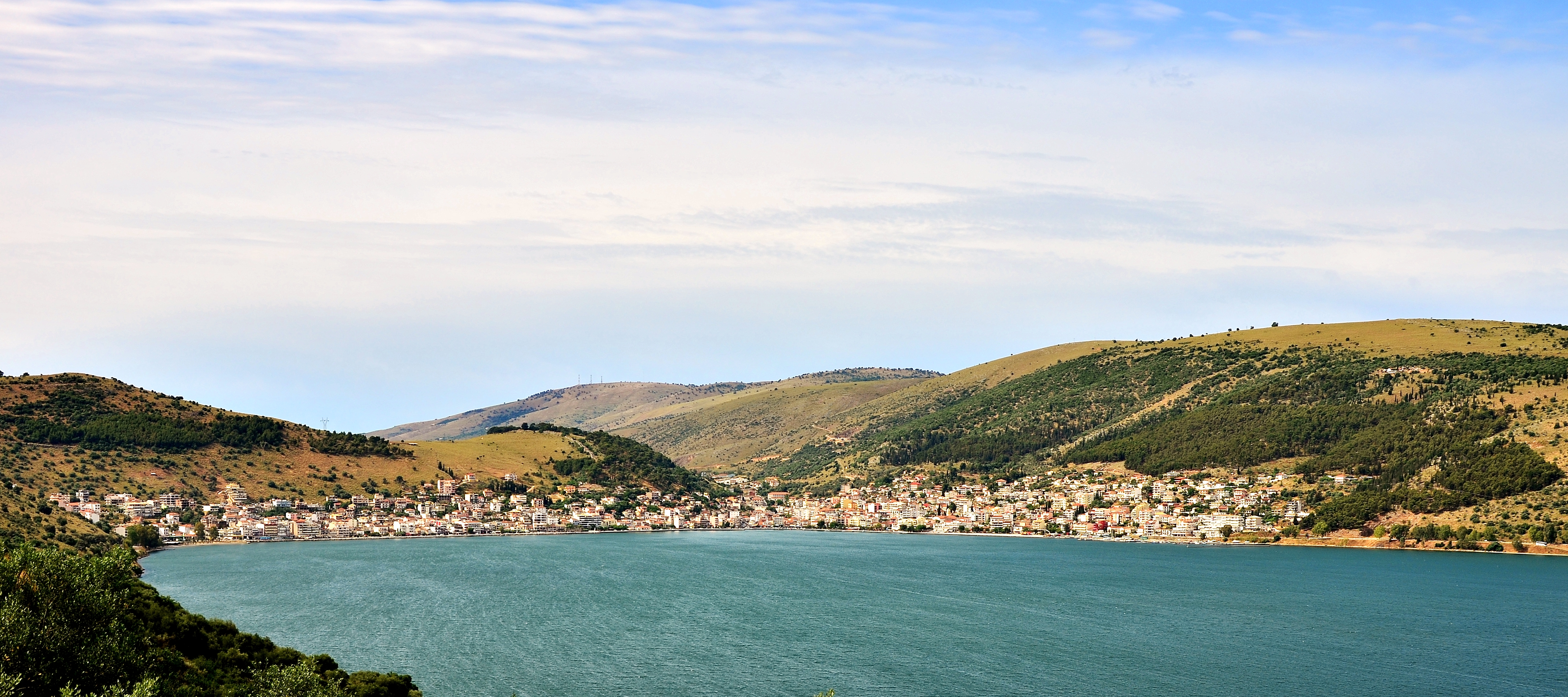 Πανοραμική εικόνα απο την Αμφιλοχία